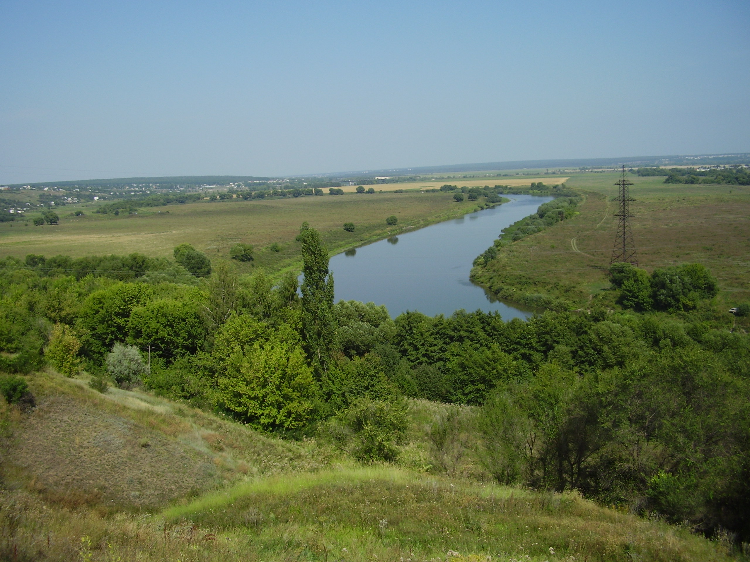 Река Дон у г.Семилук